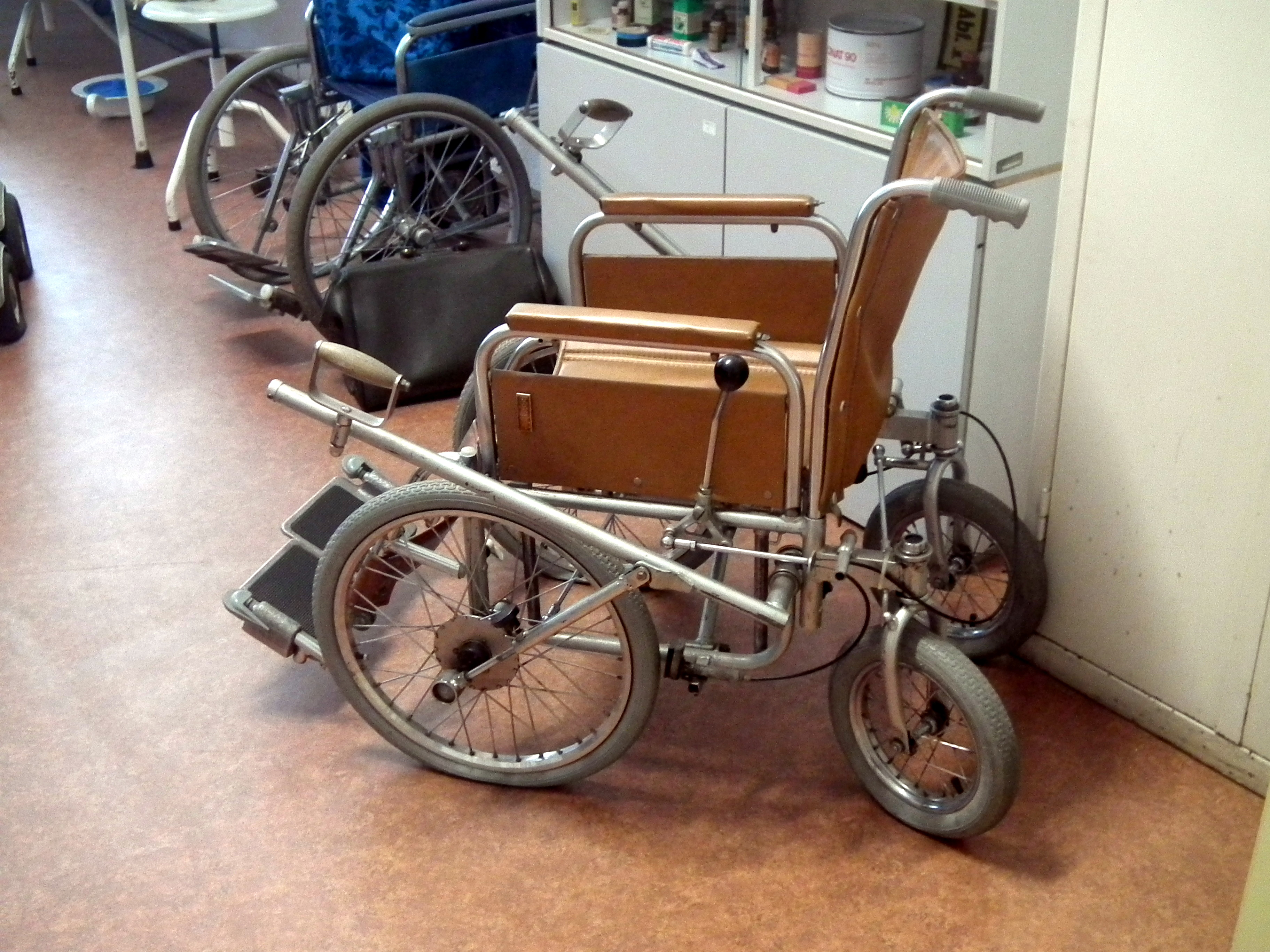 Rollstuhl, DDR-Museum Pirna, Veröffentlicht mit Genehmigung der Museumsleitung